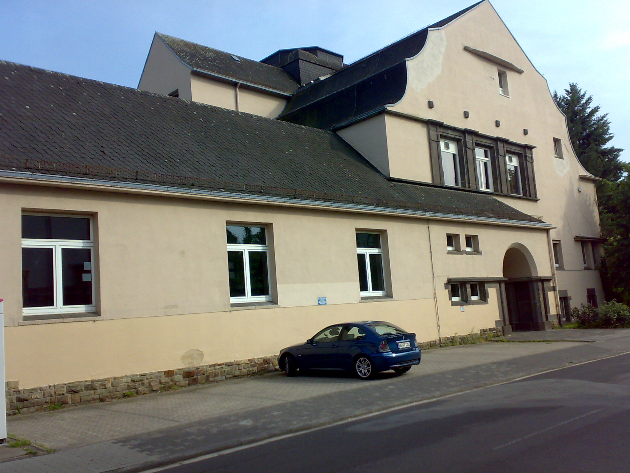 Gymnasium Oberursel